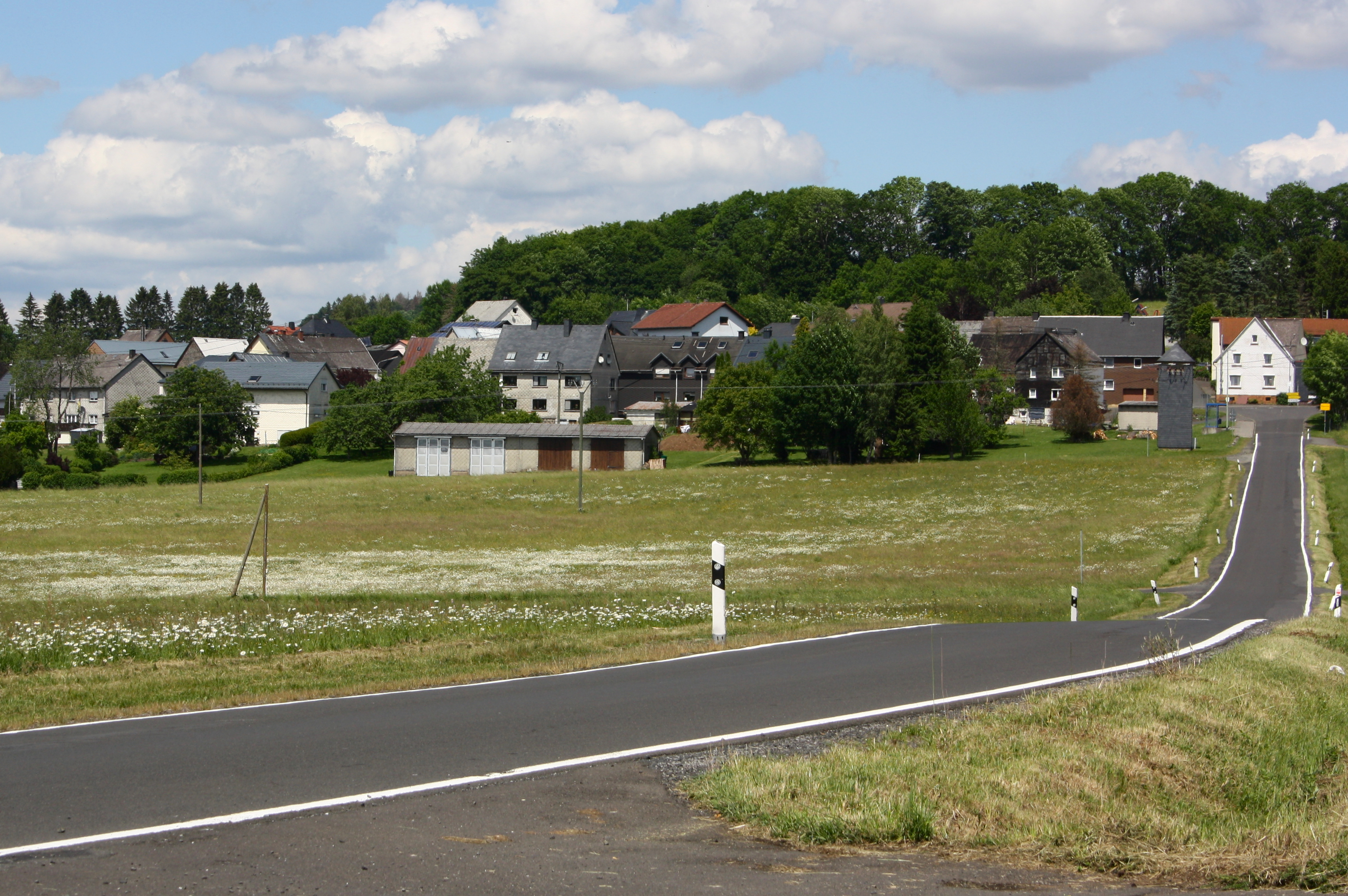 Waiganshain, Westerwald, Rheinland-Pfalz, Deutschland